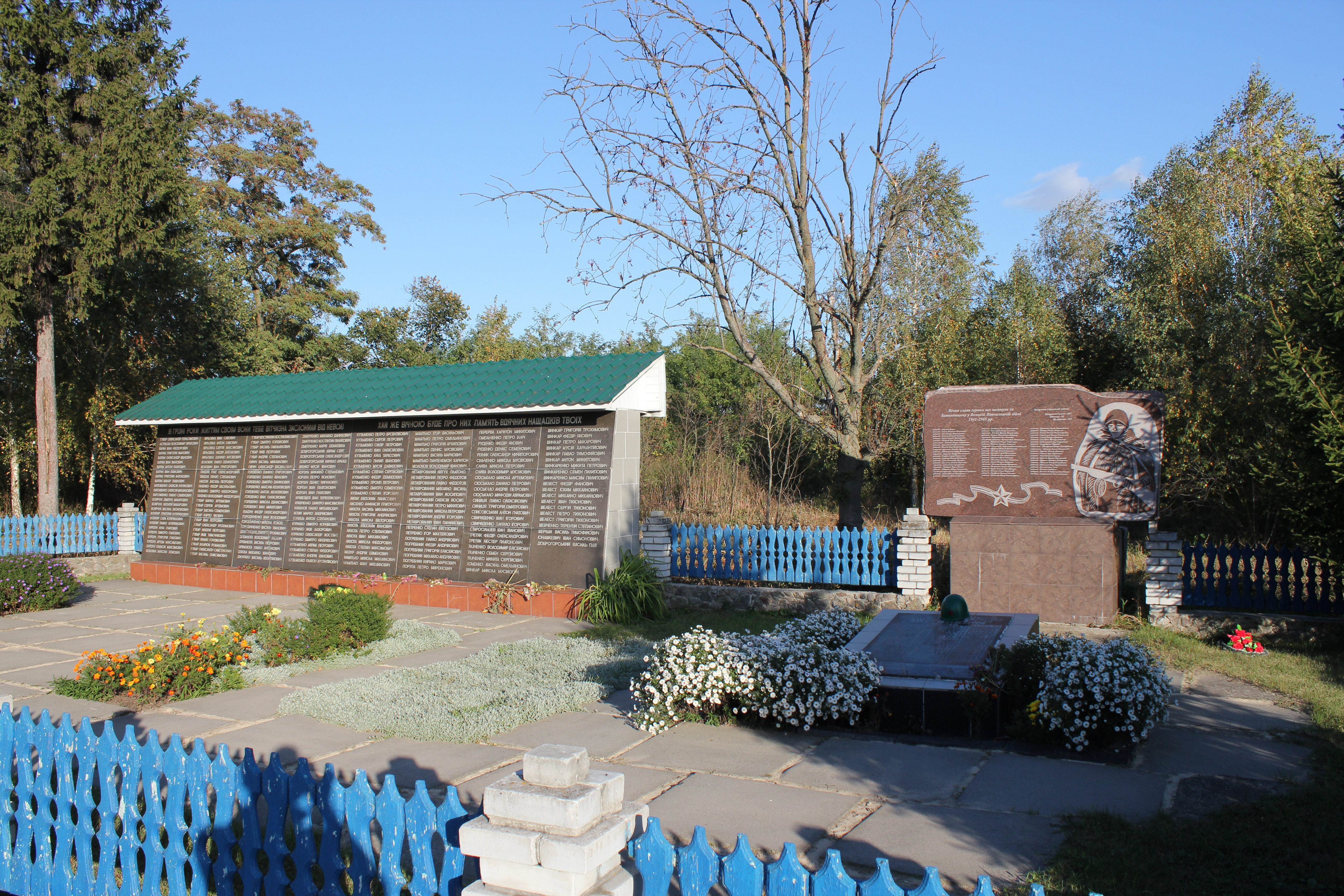 Братська могила воїнів Радянської Армії, які загинули в роки Великої Вітчизняної війни, село Дем'янці, біля Будинку культури